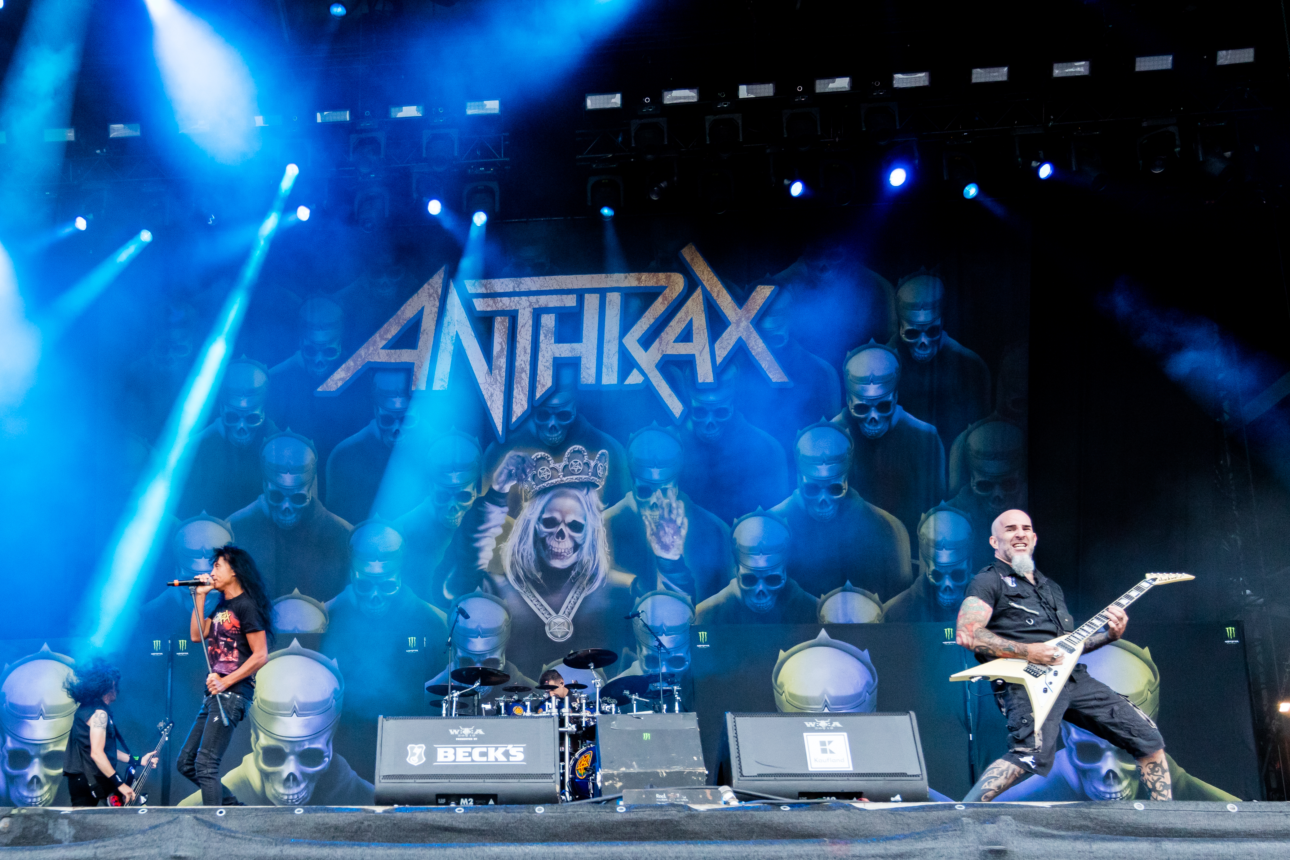 Anthrax during Wacken Open Air at The Holy Wacken Land, Wacken, Schleswig-Holstein, Germany on 2019-08-02, Photo: Sven Mandel